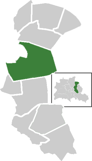 Lage des Ortsteil Alt-Hohenschönhausen im Berliner Bezirk Lichtenberg